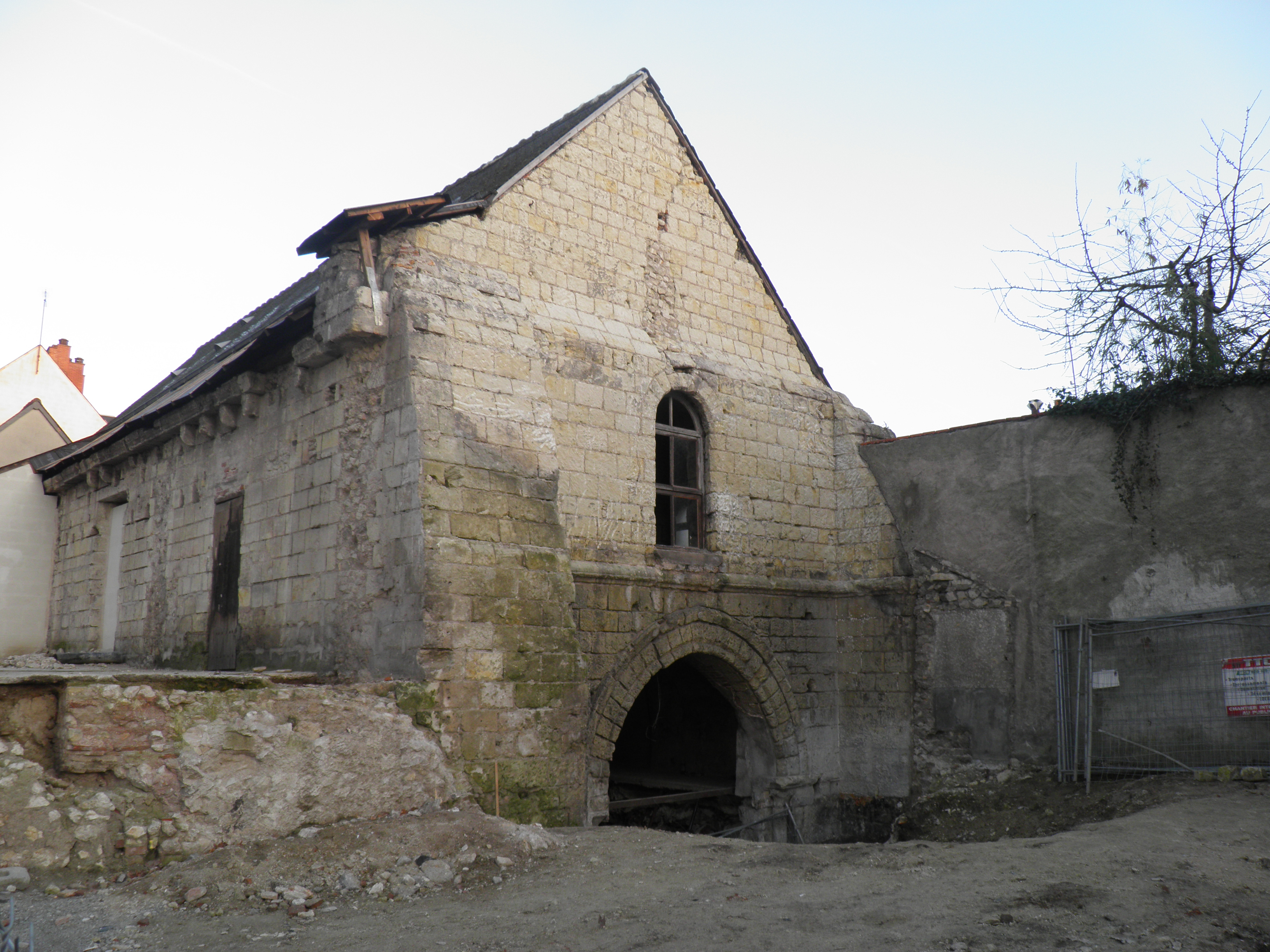 Chapelle Saint Libert Tours This building is indexed in the Base Mérimée, a database of architectural heritage maintained by the French Ministry of Culture, under the references PA00098154 and IA00071229 .